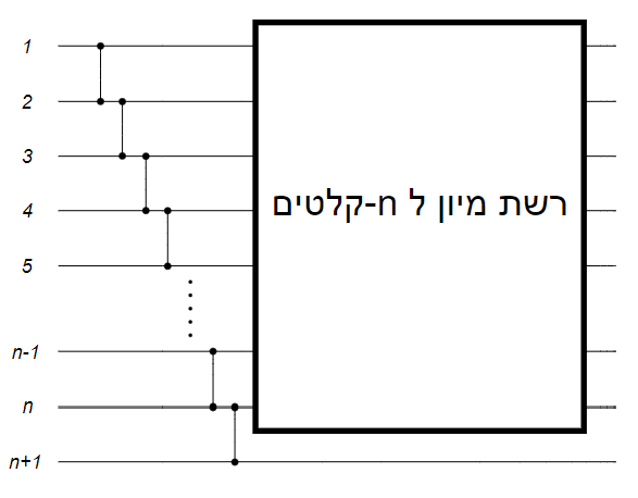 רשת מיון בנוייה בהשראת מיון בועות